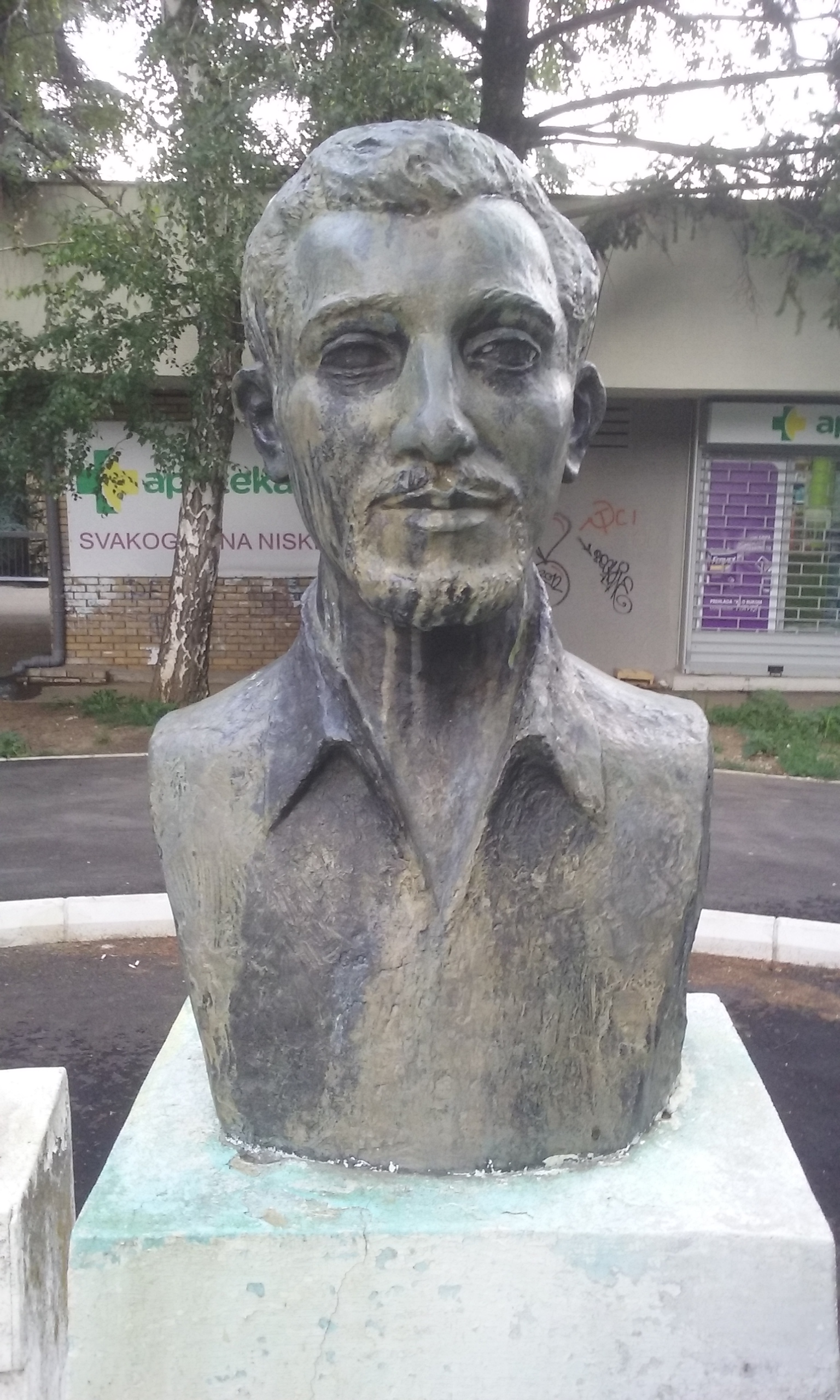 Споменик Небојши Јерковићу у насељу Браћа Јерковић у Београду.